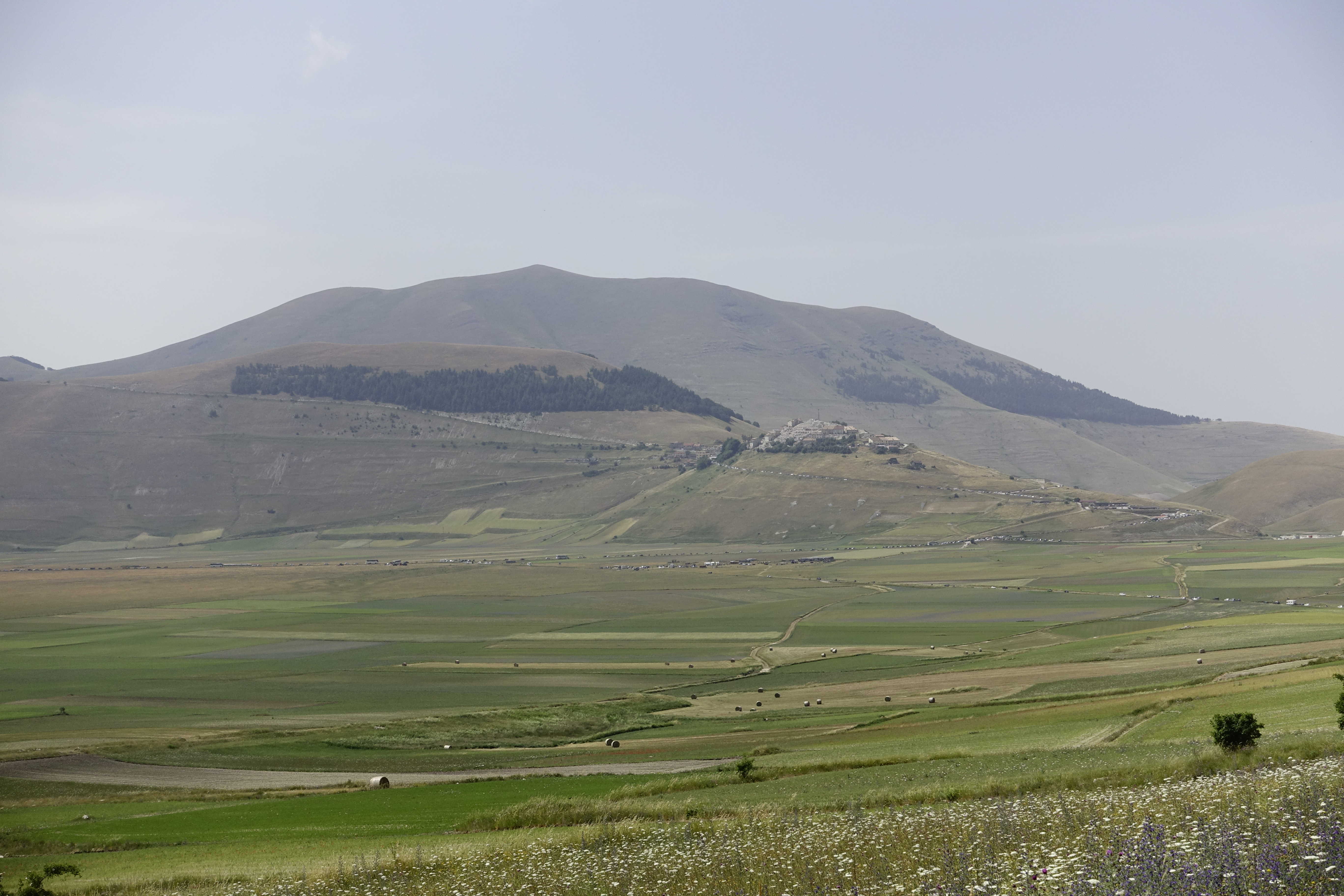 Piani di Castelluccio di Norcia (PG)